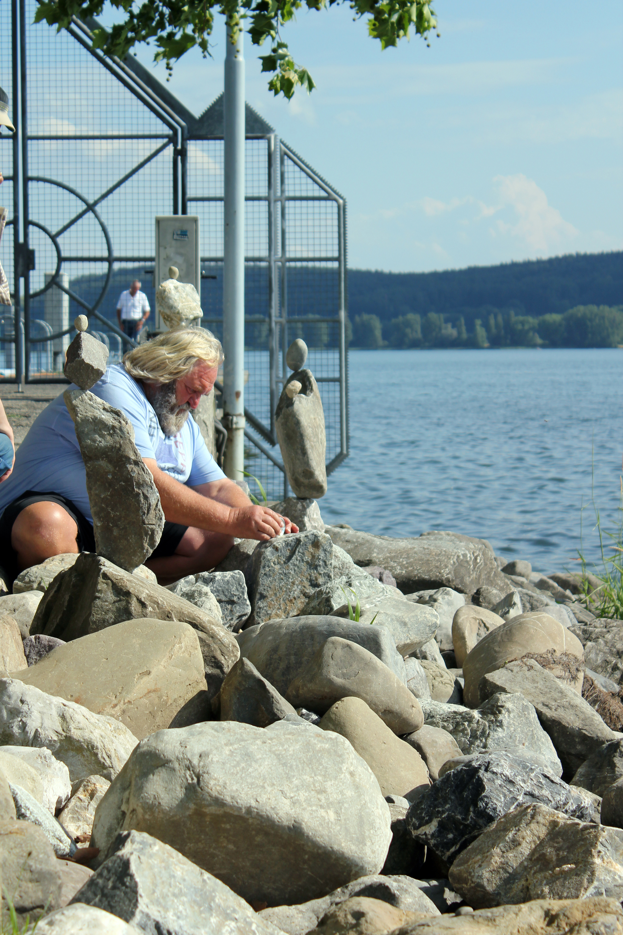 Josef „Sepp“ Bögle in Aktion, Radolfzell, Juni 2011